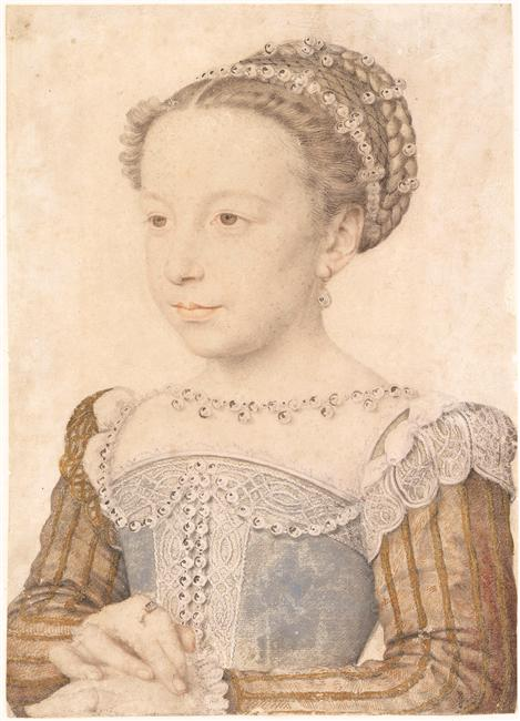 Marguerite de France reine de Navarre (1553-1615)